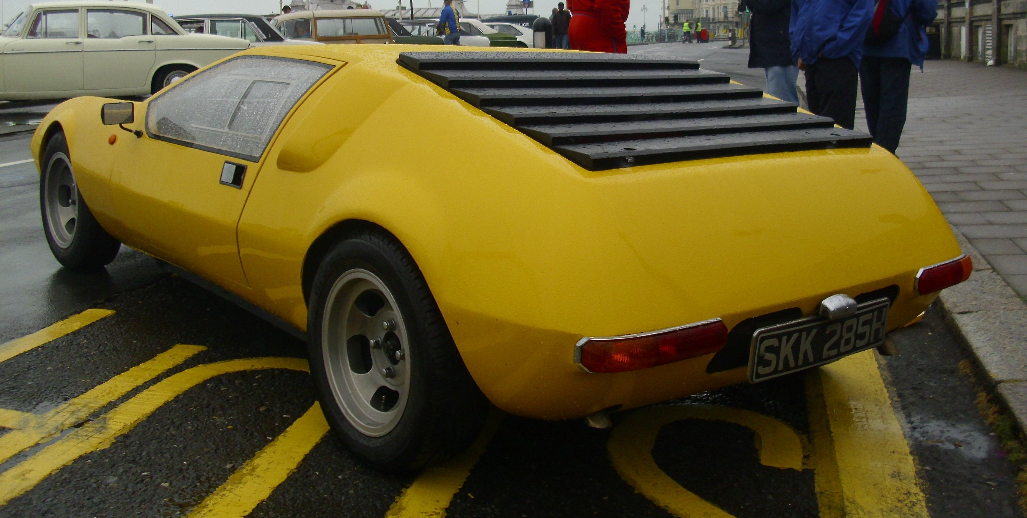 Gilbern T 11 1970